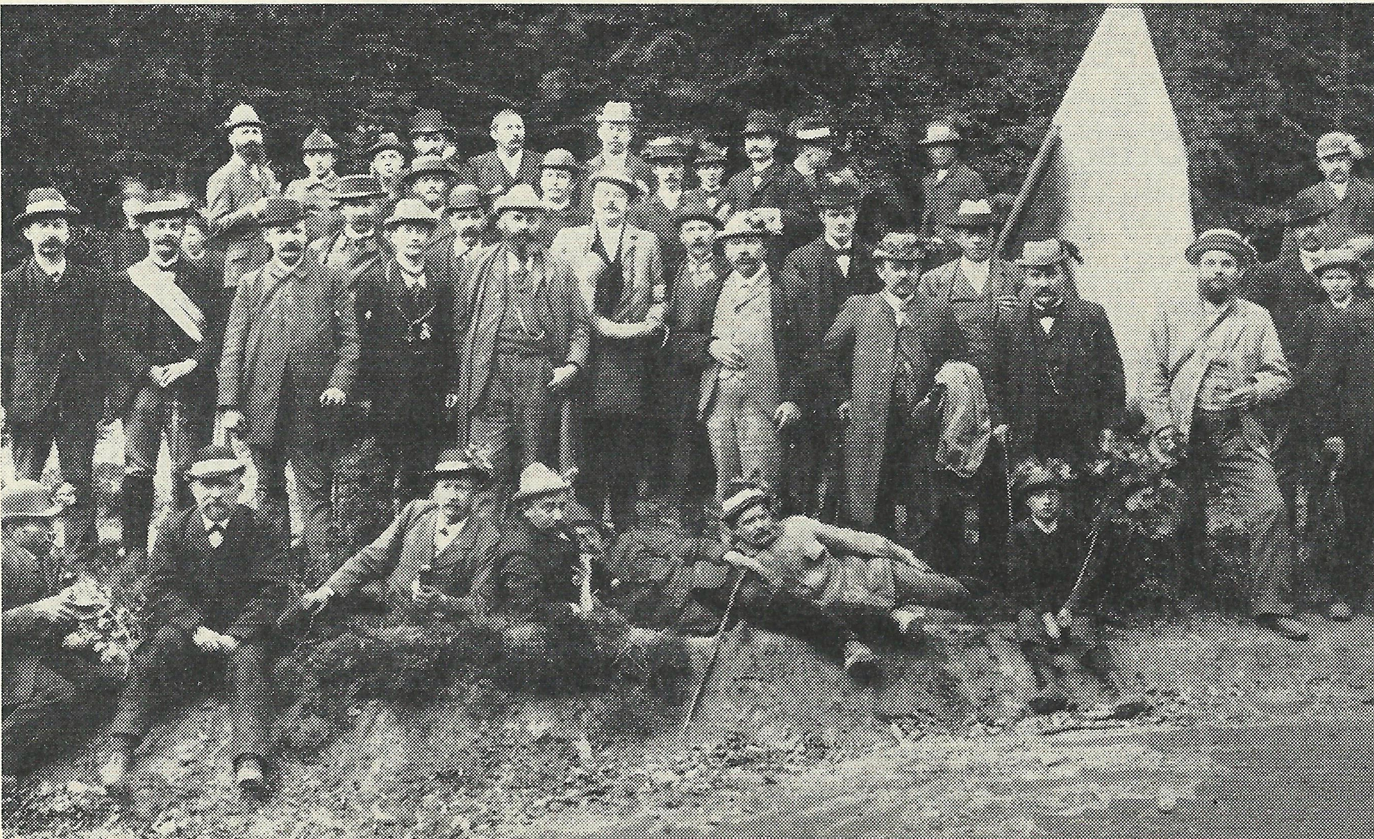 Die Briloner Schnade 1896